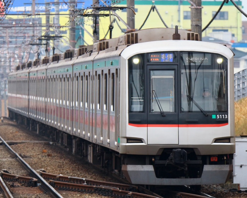 東急5000系5113編成 東急田園都市線南町田駅